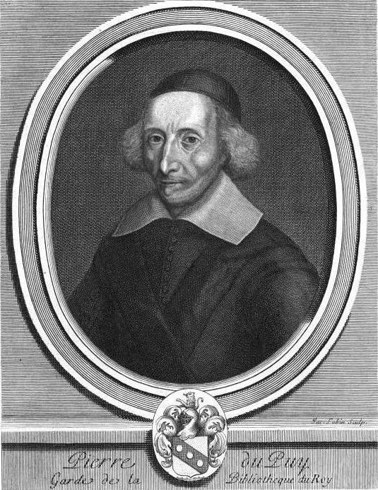 "Pierre Dupuy, garde de la bibliothèque du roi."